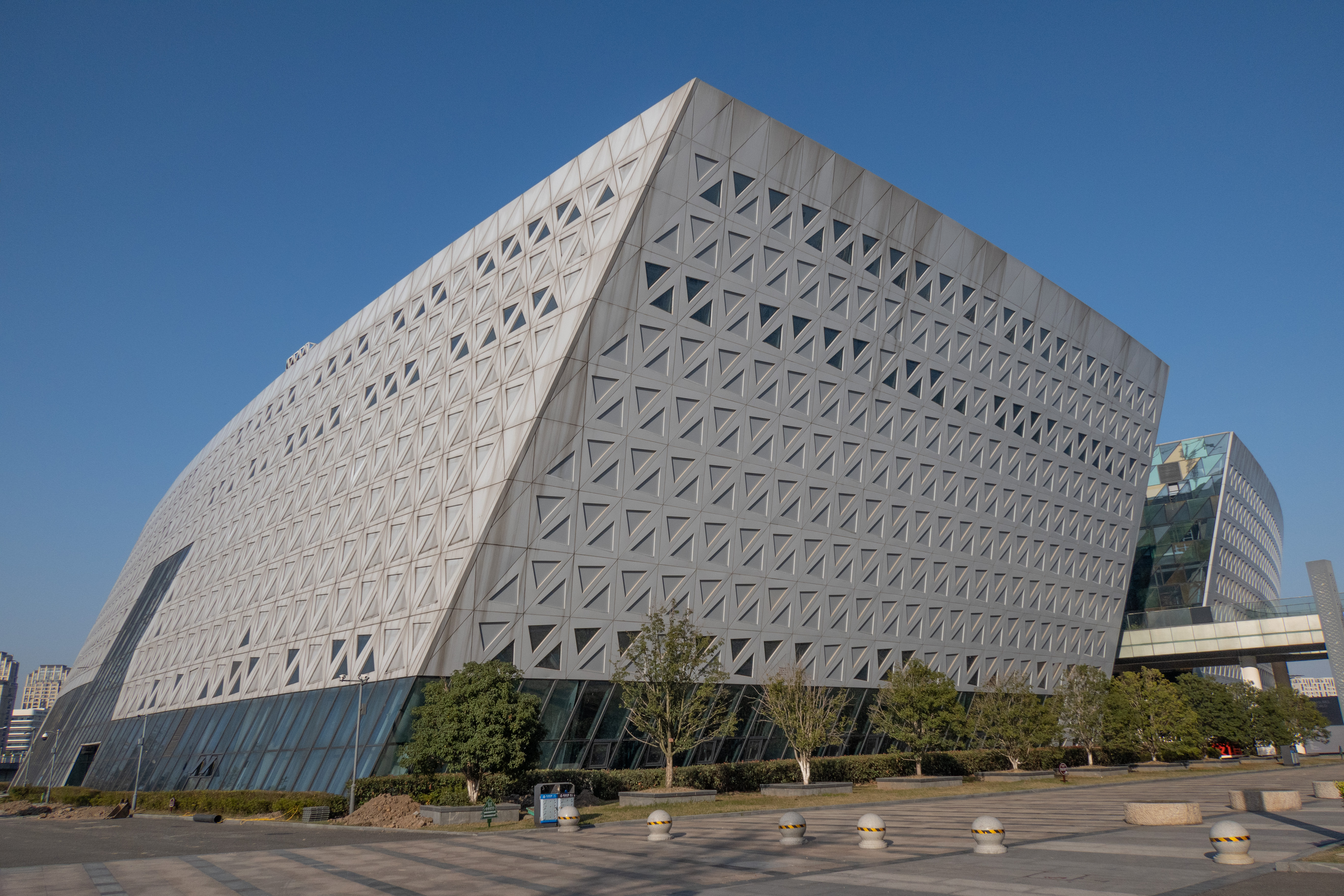 慈溪博物馆